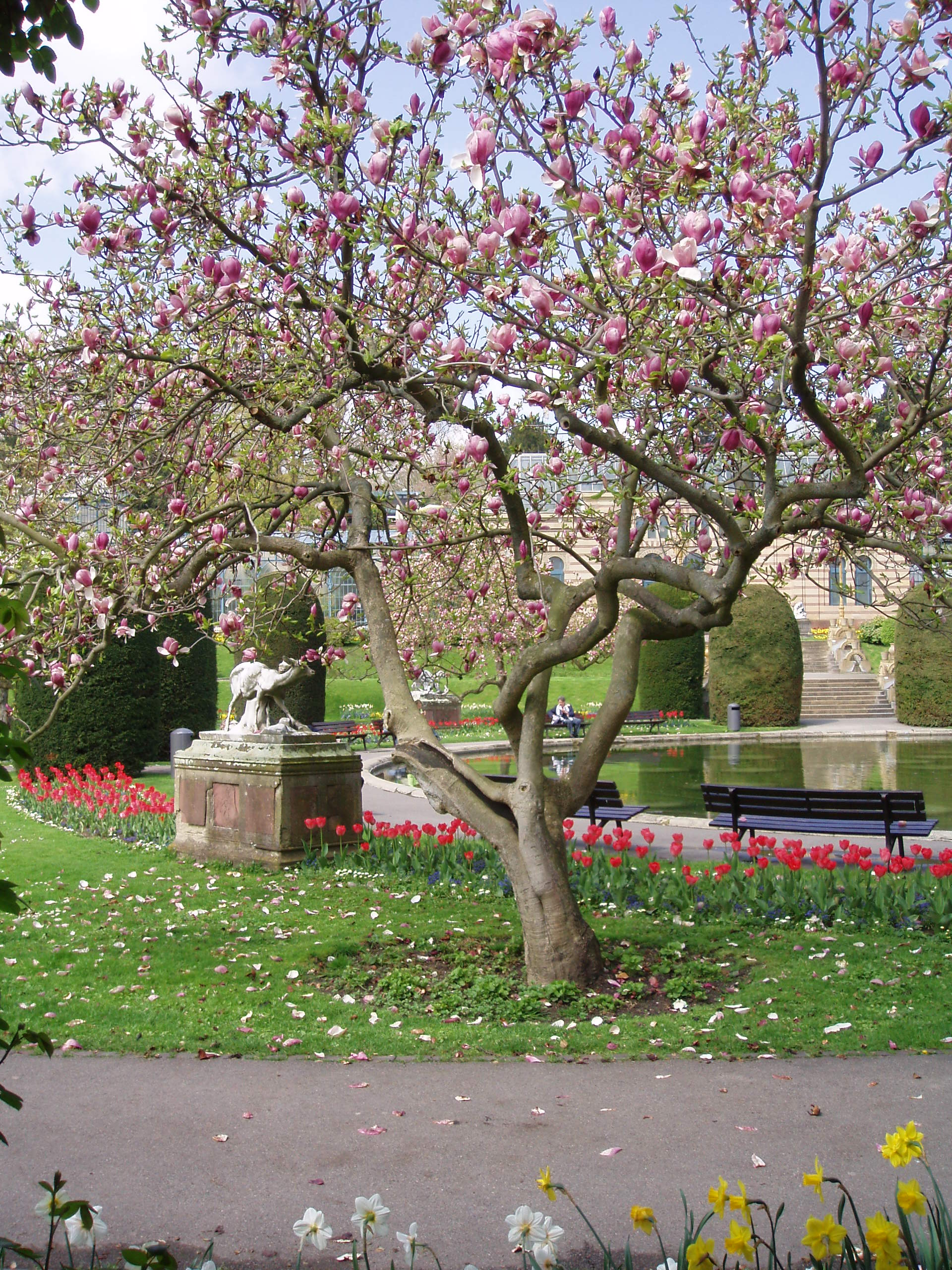 Magnolienblüte in der Wilhelma